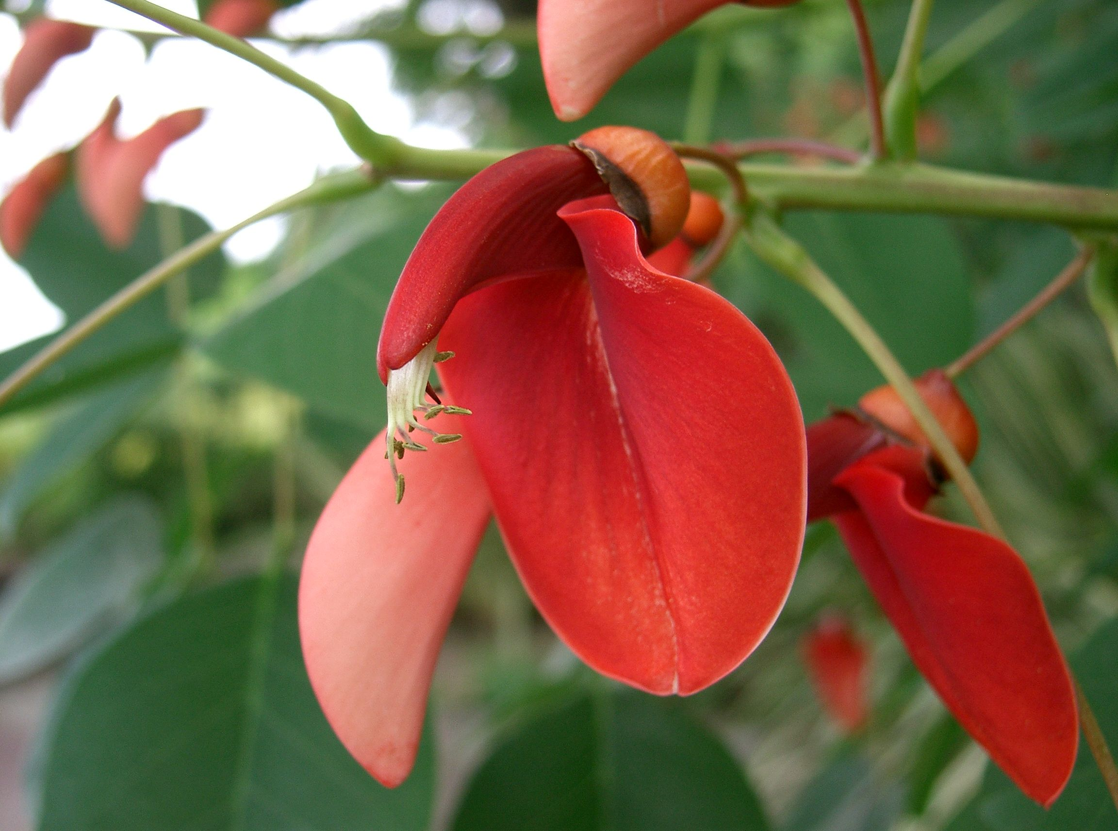 Erythrina crista-galli